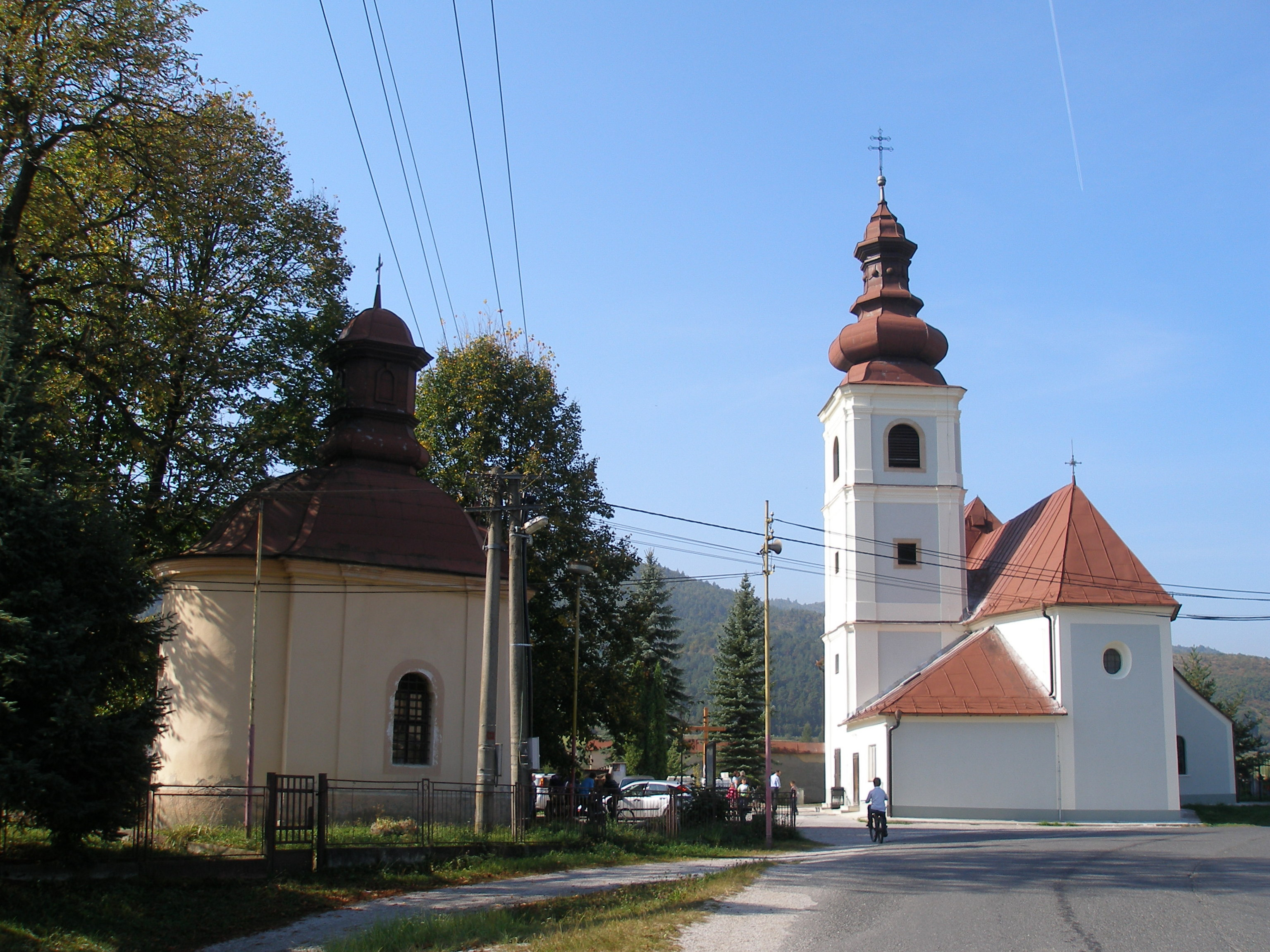 Spišská obec Kluknava okres Gelnica.